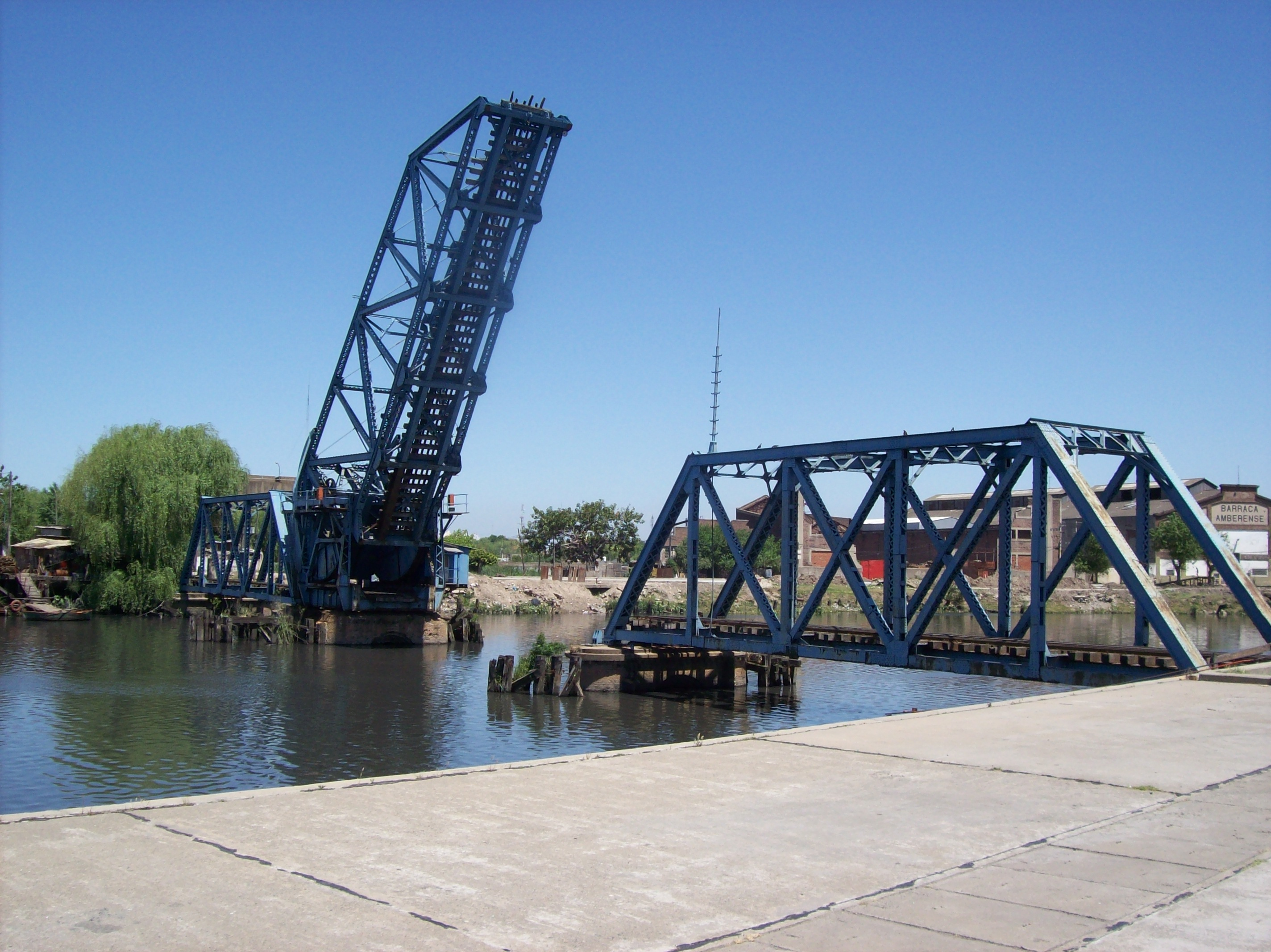 Puente Barraca Peña en el momento de la apertura de la parte central. Este puente de ferrocarril cruza el Riachuelo uniendo el barrio de La Boca en la Ciudad de Buenos Aires con el Partido de Avellaneda, Provincia de Buenos Aires, Argentina.